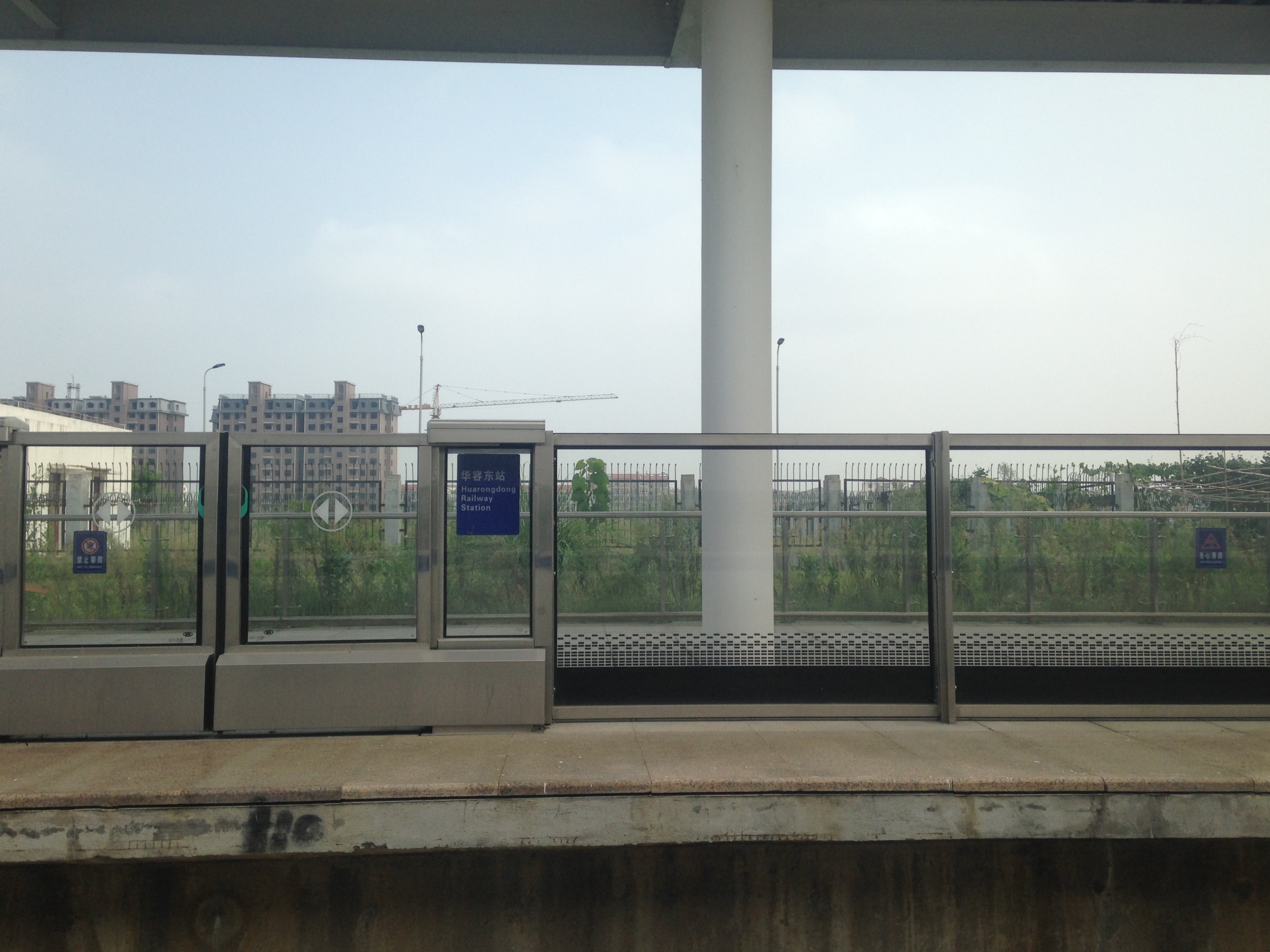 武岡都市間鉄道の列車内より望む華容東駅のホーム